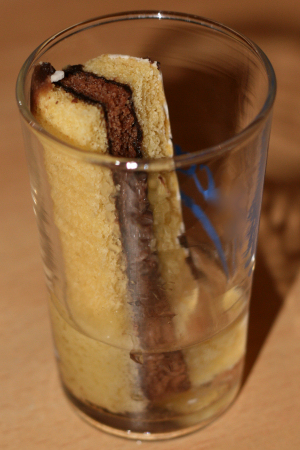 Verre de napolitka